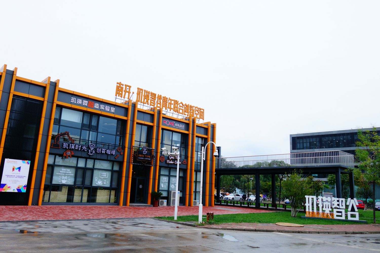 南开大学众创空间